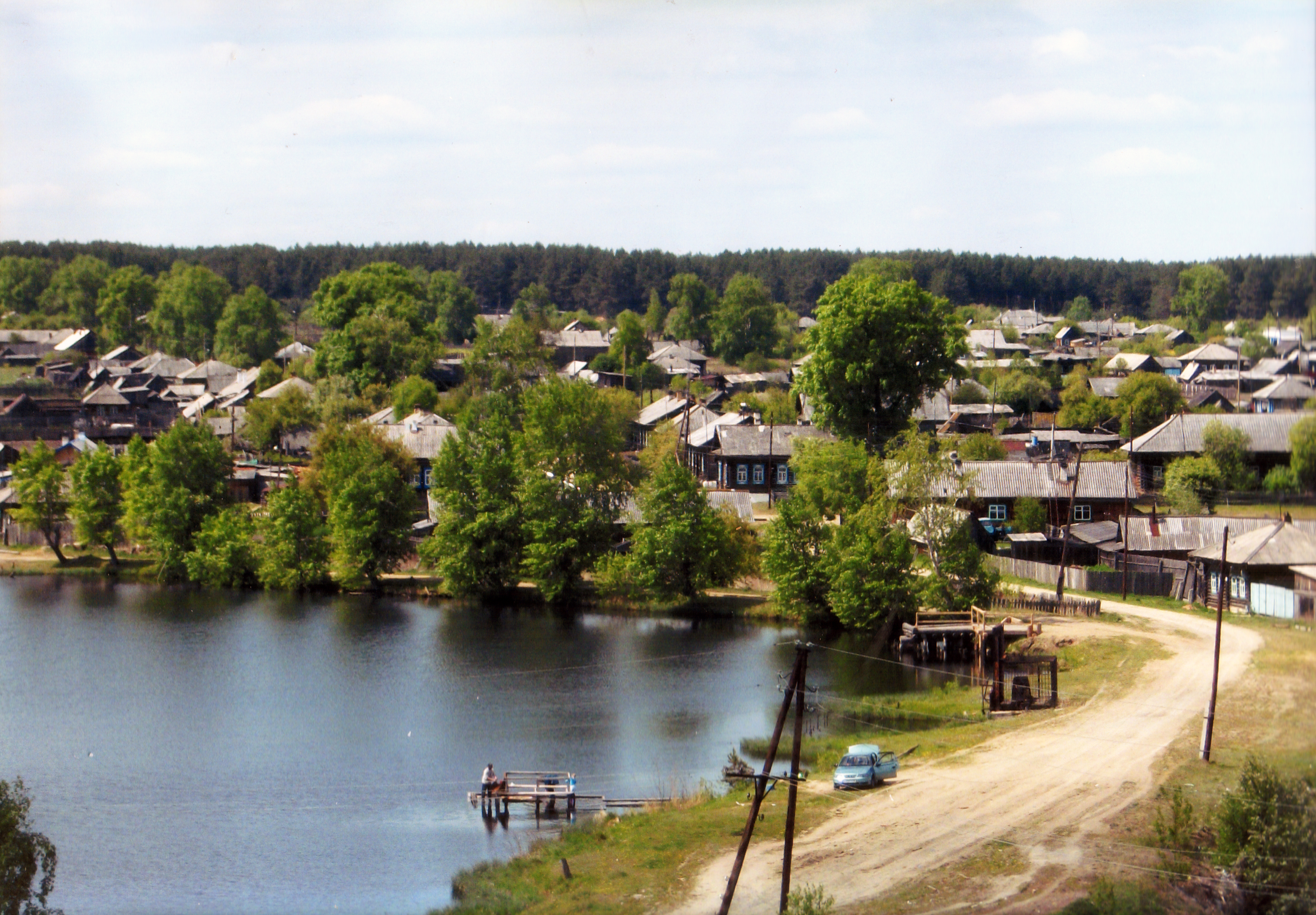 Посёлок Ертарский